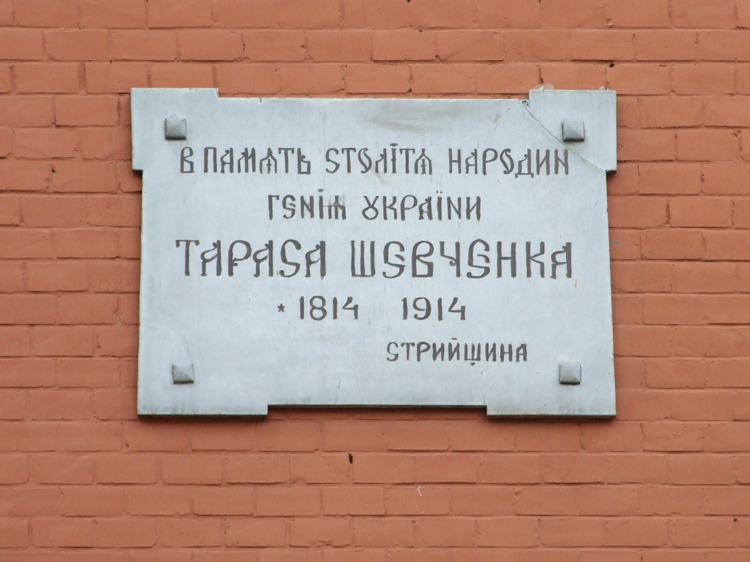 Народний дім, 1900 р.